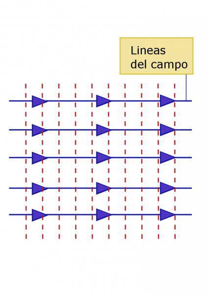 Representación de las lineas de campo y equipotenciales que produce un campo eléctrico